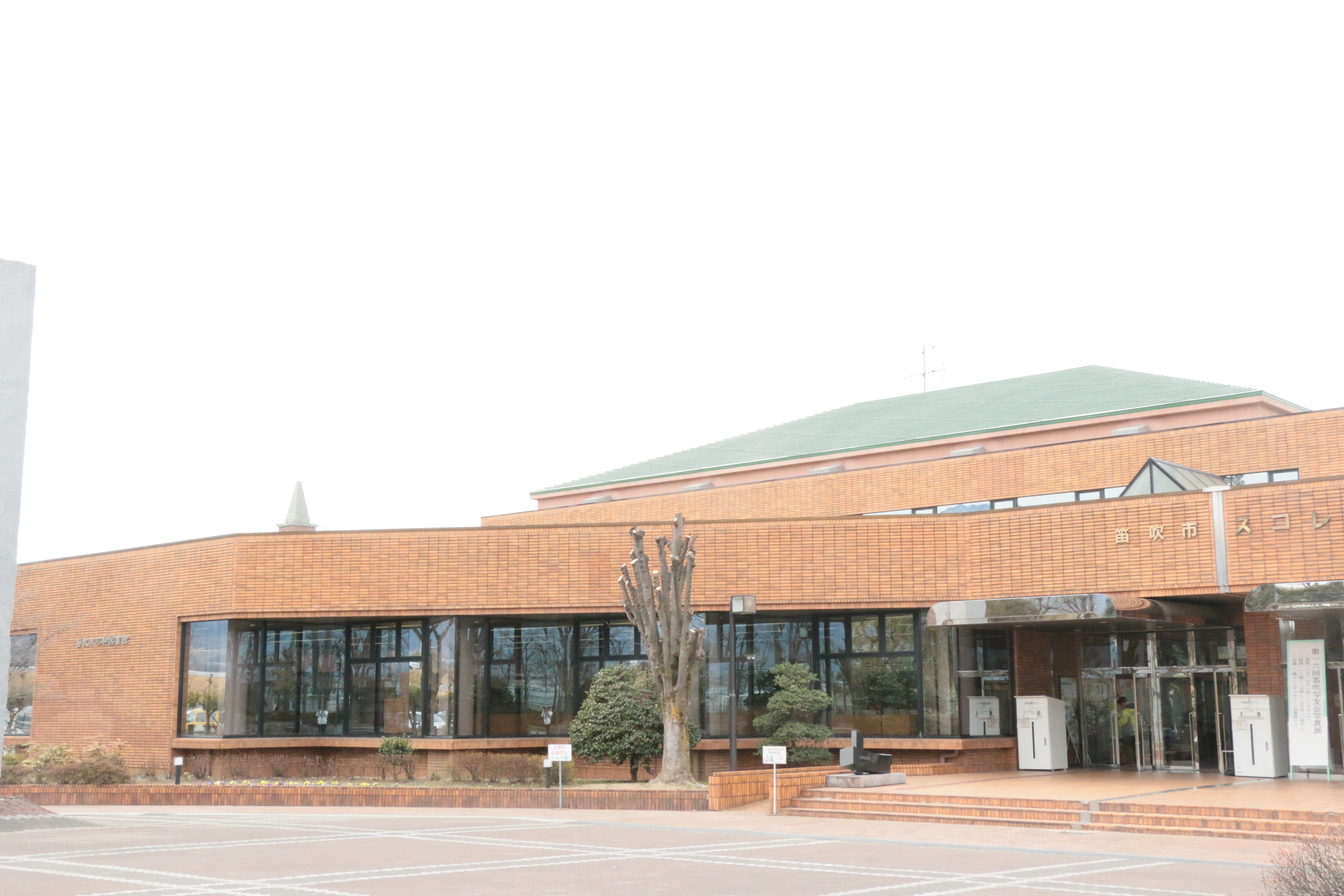 笛吹市石和図書館